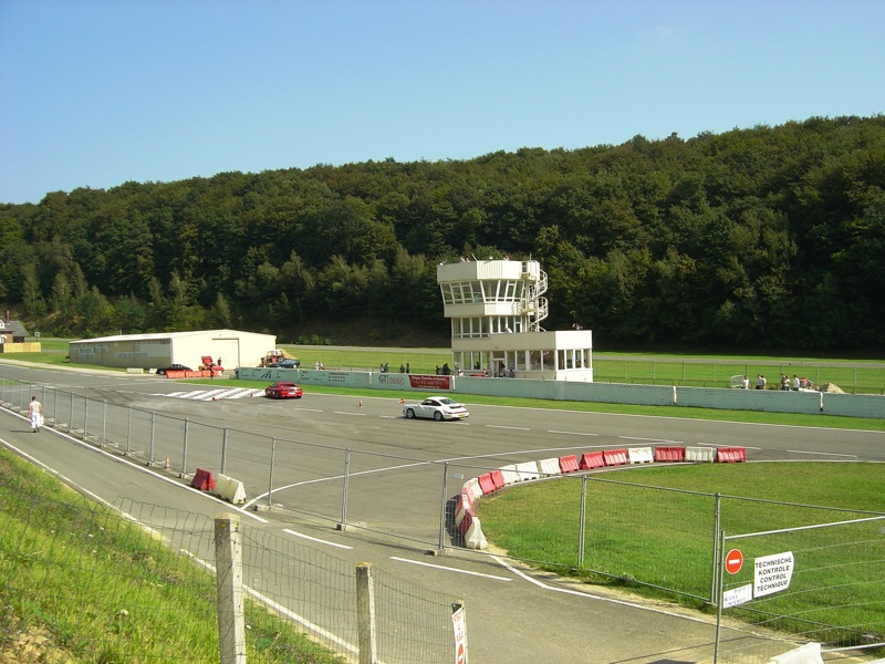 Circuit automobile de Folembray, Aisne, France.